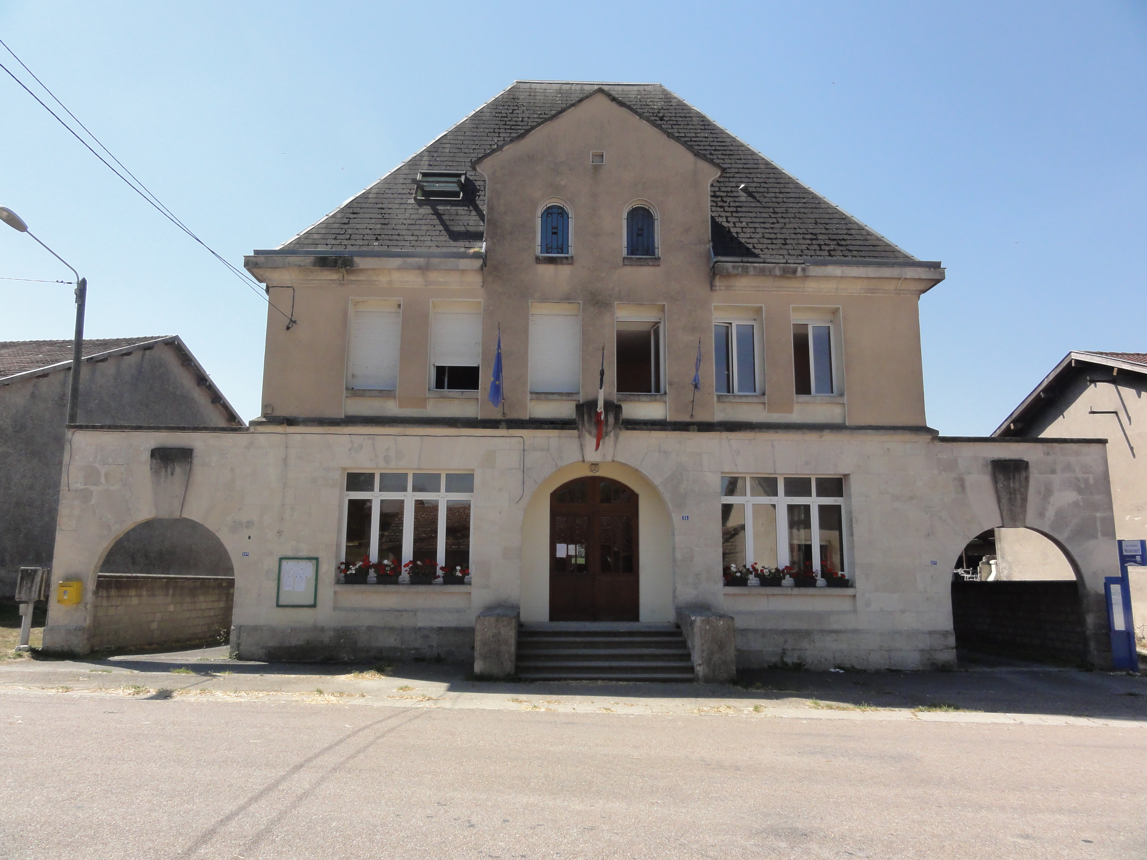 Malancourt (Meuse) mairie